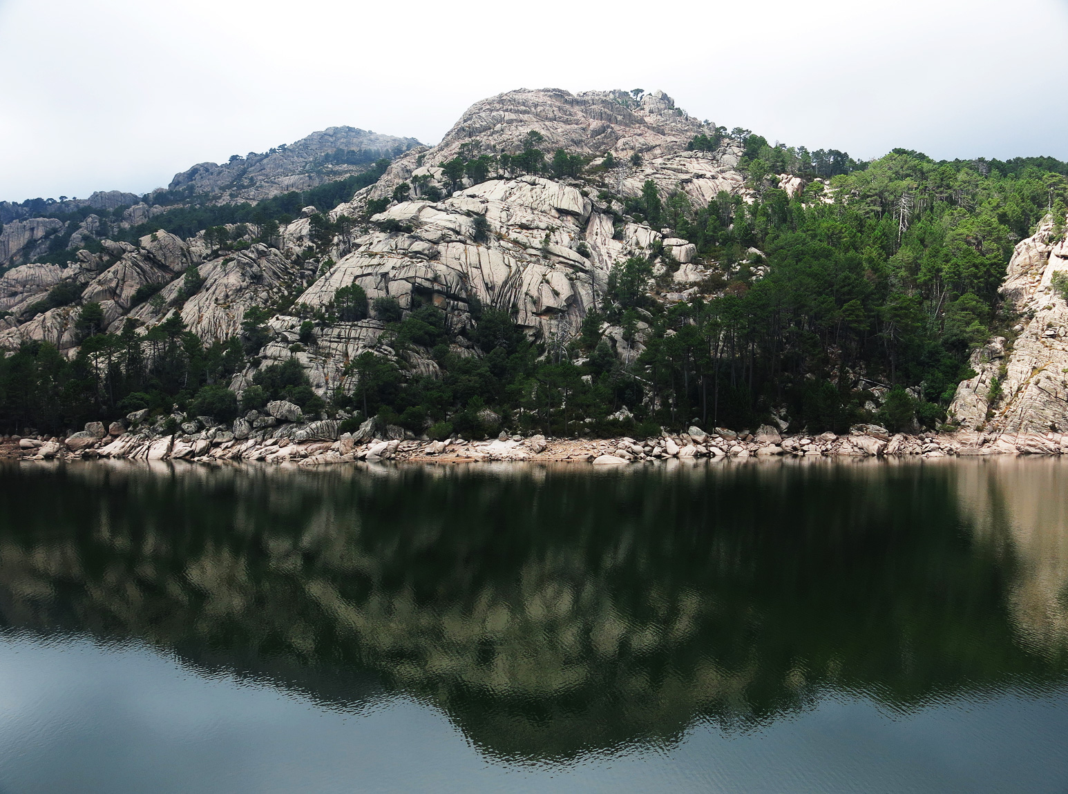 Le lac de l'Ospédale.